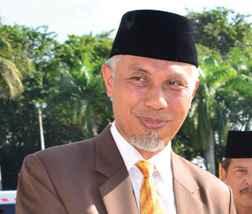 Mahyeldi wako Padang